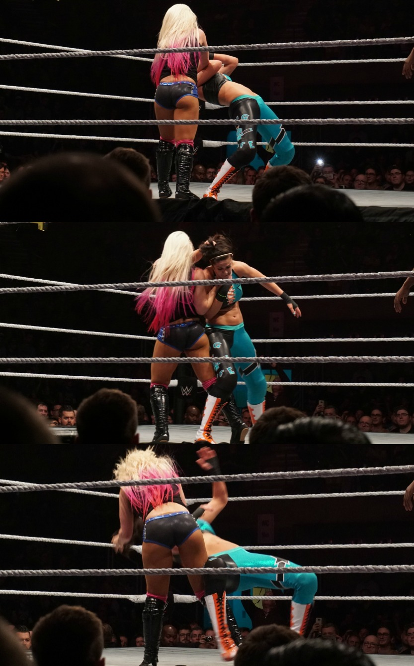 Alexa Bliss performing her signature chokehold STO on Bayley during a WWE live event in May 12, 2017.